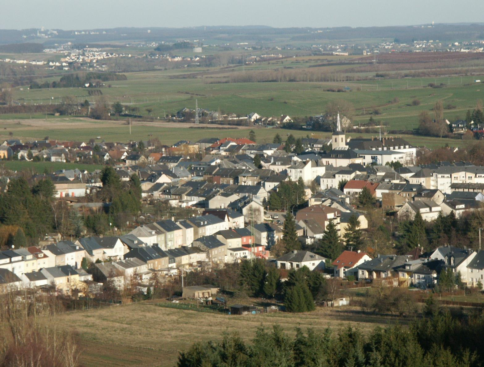 Le village luxembourgeois de Kayl